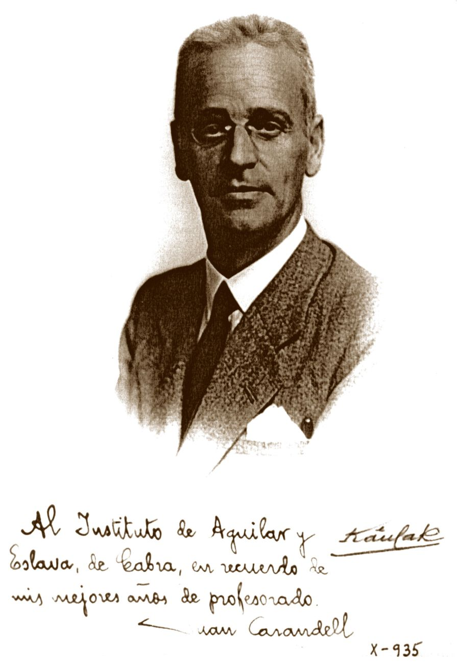 Juan Carandell Pericay, cuadro-dedicatoria a sus compañeros del Instituto Aguilar y Eslava